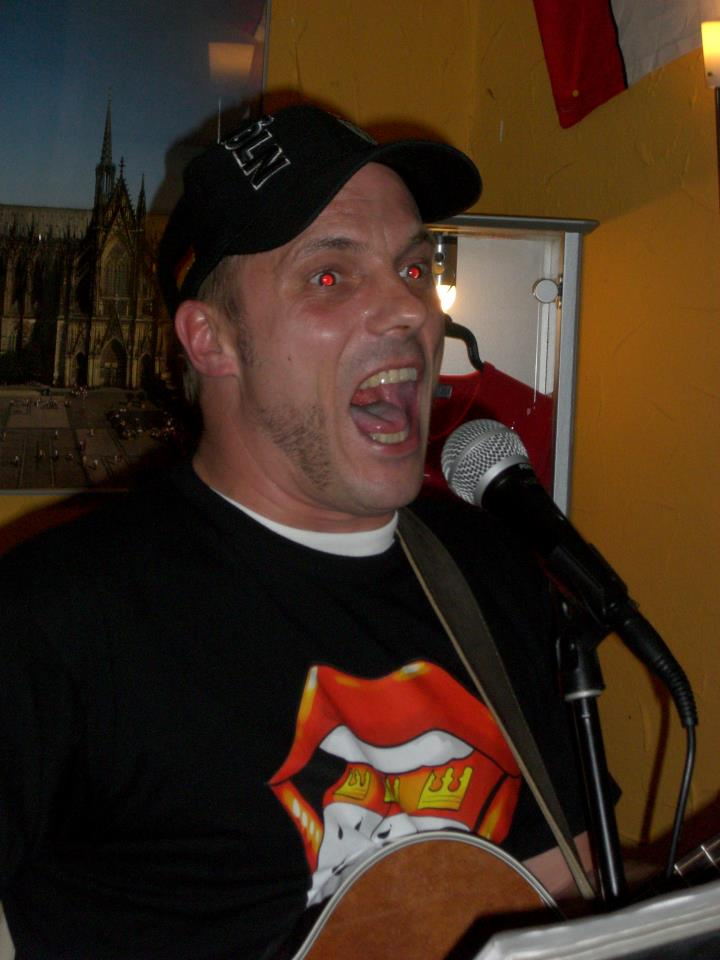 Ne Rheinische Jeck bei einem Konzert in München am 04. November 2011, Münchens großer Karnevals-Warmup-Mitsingabend